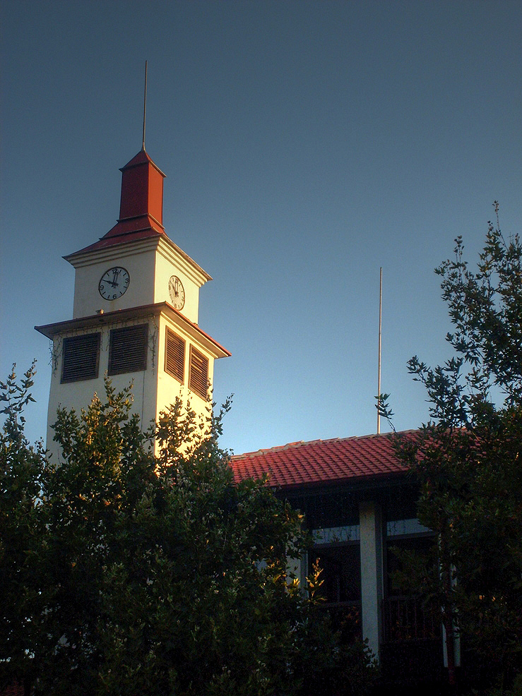 Sozopol municipal hall